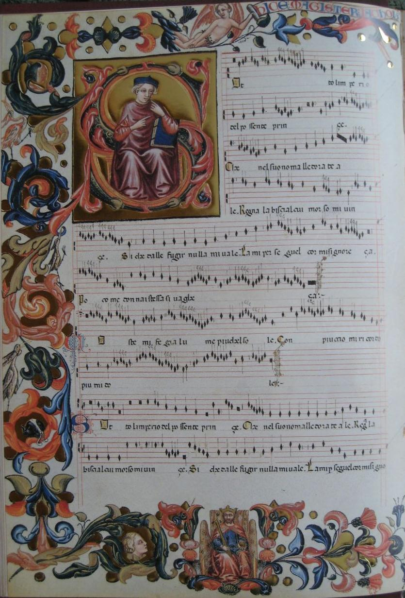 Sotto l'imperio, Codex Squarcialupi